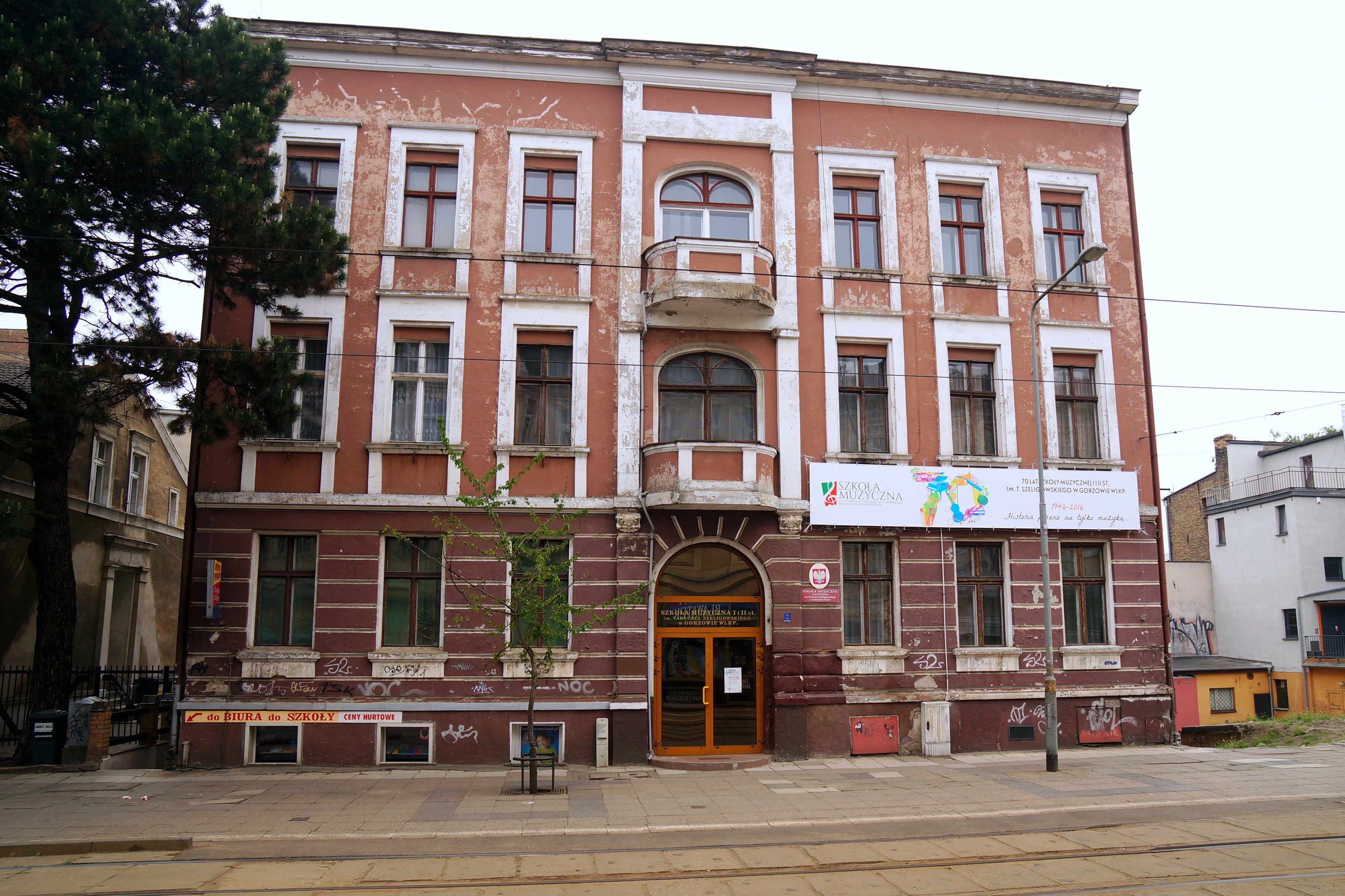 Gorzów Wlkp., ul. Chrobrego 3. Szkoła Muzyczna I i II stopnia im. Tadeusza Szeligowskiego. W 2016 r. budynek wymagał pilnego remontu.